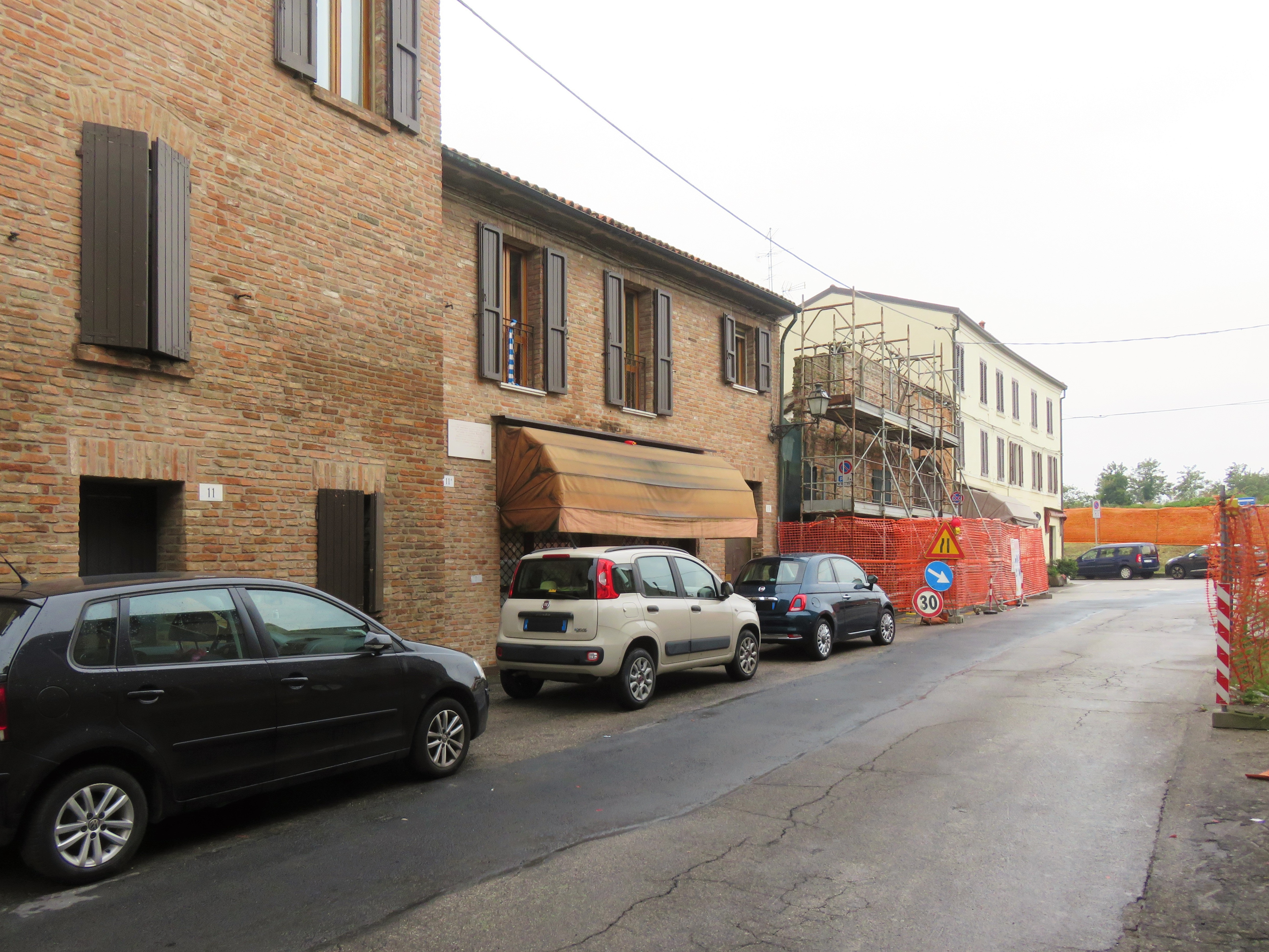 Via Spronello